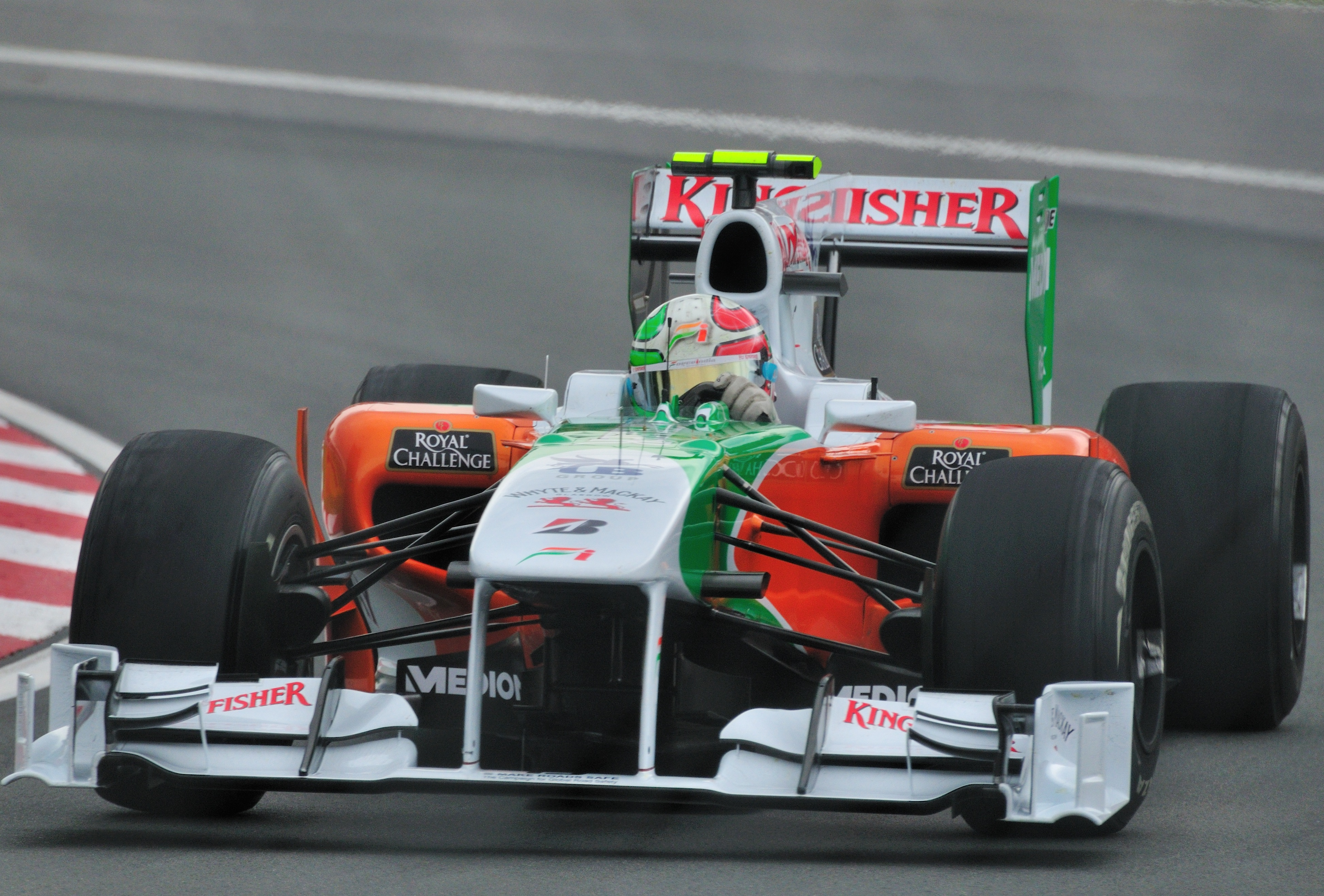 Force India driver Vitantonio Liuzzi's VJM03 in the Senna corner (2010 Montreal GP)